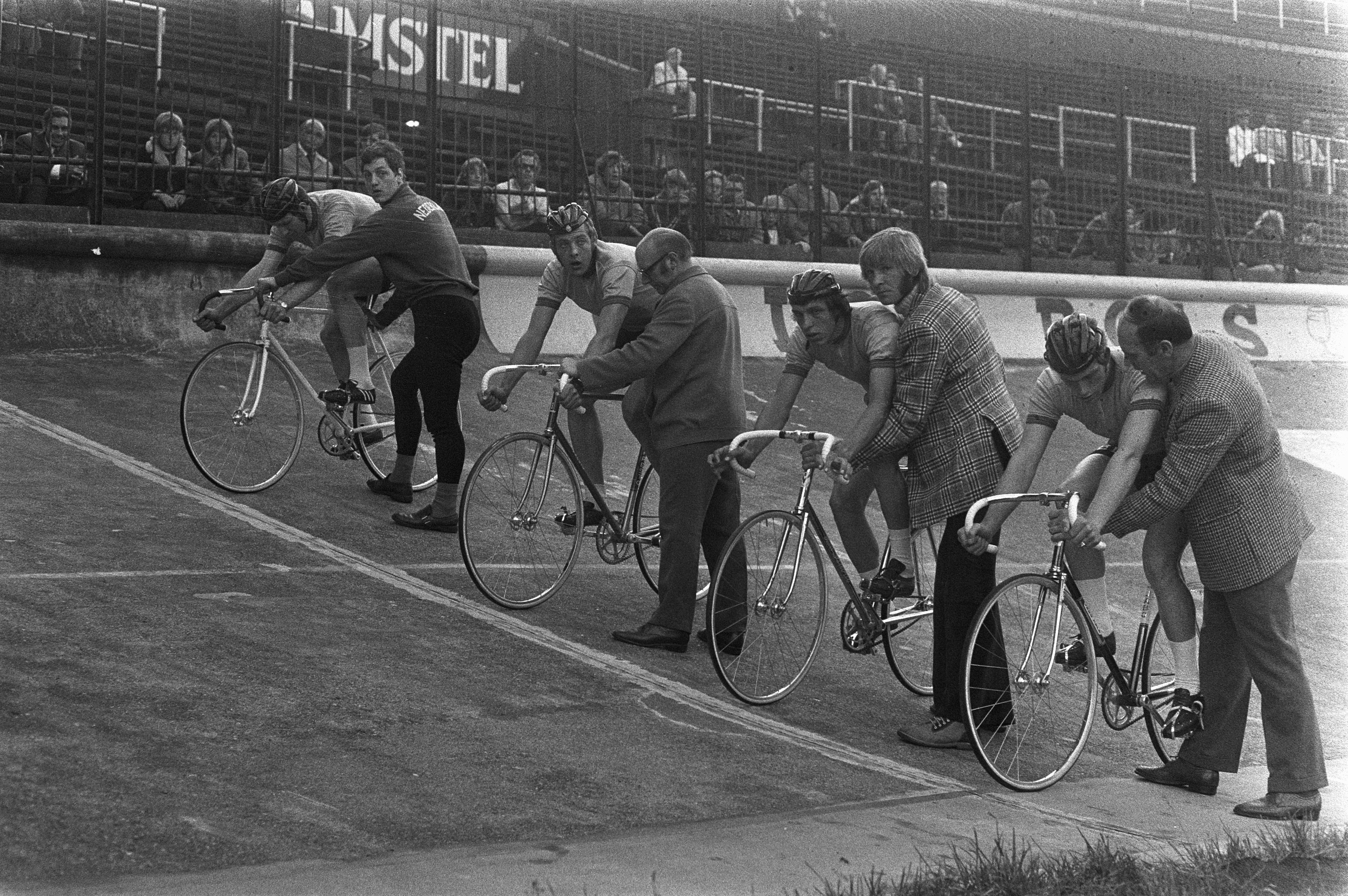 Collectie / Archief : Fotocollectie Anefo Reportage / Serie : Wielrennen om Grote Prijs van Amsterdam in Olympisch Stad Beschrijving : Olympische A-selectie achtervolgingsploeg (Roy Schuiten, Gerard Kamper, Ad Dekkers, Nieuwenhuis) Datum : 22 juni 1972 Locatie : Amsterdam, Noord-Holland Trefwoorden : baanwielrennen, fietsen, stadions, wielersport, wielrennen Persoonsnaam : Dekkers, Ad, Kamper, Gerard, Nieuwenhuis, [...], Schuiten, Roy Fotograaf : Verhoeff, Bert / Anefo Auteursrechthebbende : Nationaal Archief Materiaalsoort : Negatief (zwart/wit) Nummer archiefinventaris : bekijk toegang 2.24.01.05 Bestanddeelnummer : 925-6870